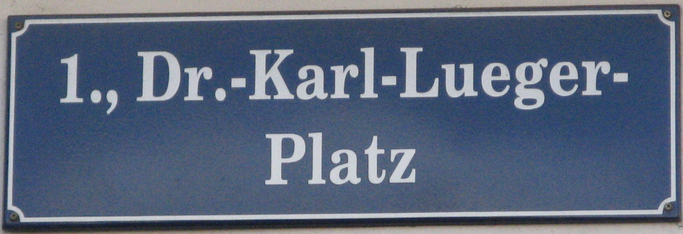 Straßenschild Dr.-Karl-Lueger-Platz, Wien-Innere Stadt